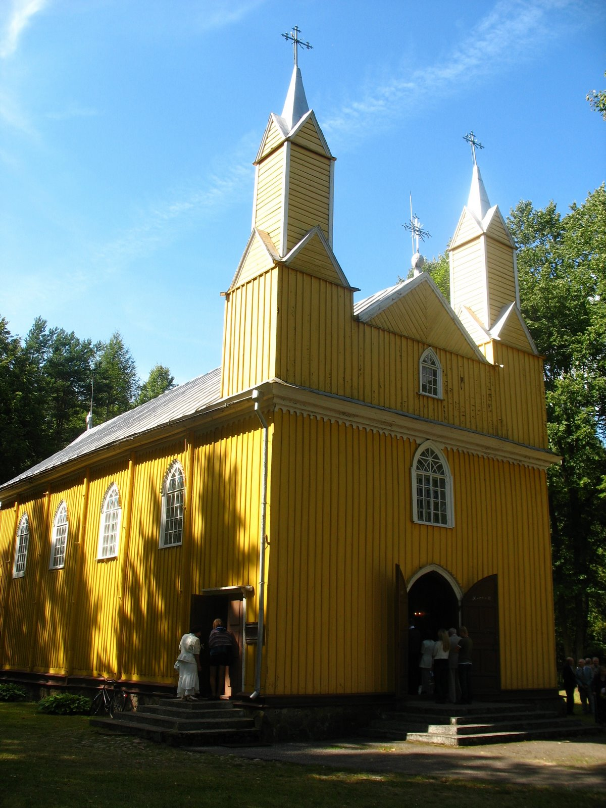 Kabelių bažnyčia